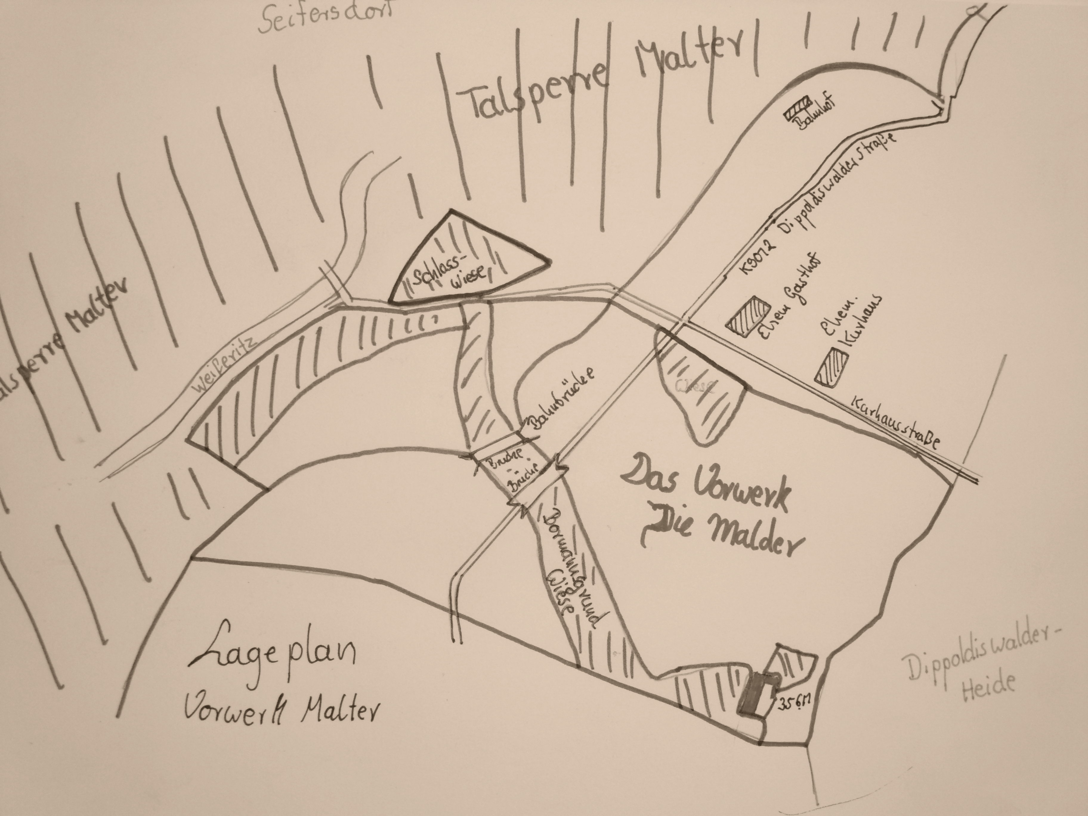 Der Lageplan zeigt das Vorwerk mit seiner Hufe in Malter bei Dippoldiswalde